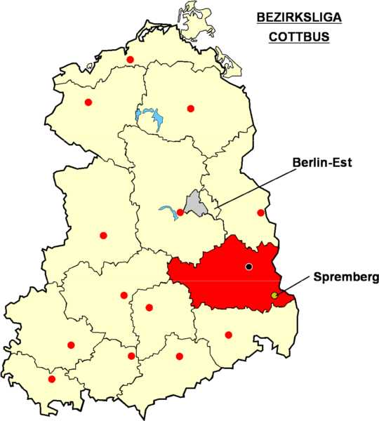 Localisation de Spremberg dans la "Bezirksliga Cottbus" à l'époque de la RDA Catégorie:Logo de clubs de football - Allemagne